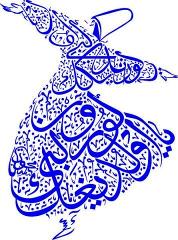 Татарча/tatarça: Дервиш Руми